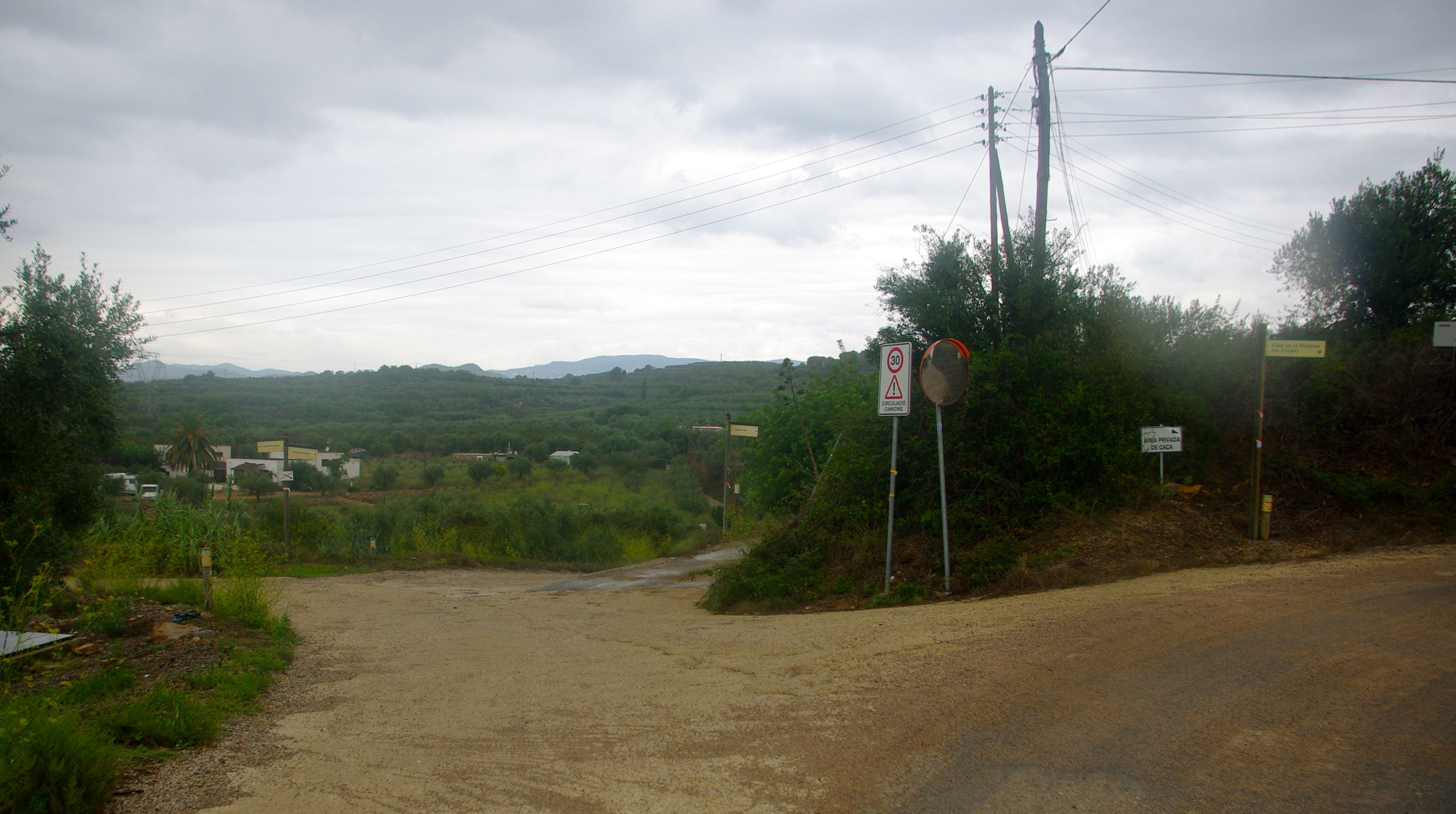 Els Cinc Camins, cruïlla de camins al terme de Reus